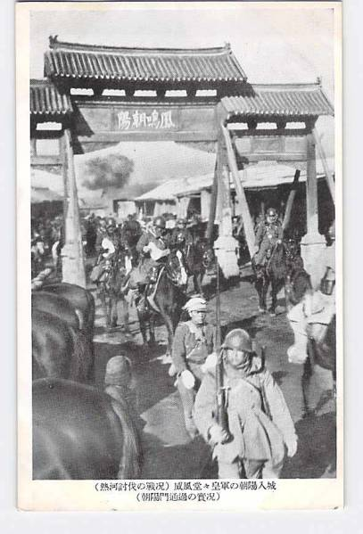 1933年日军在热河之战中进入朝阳